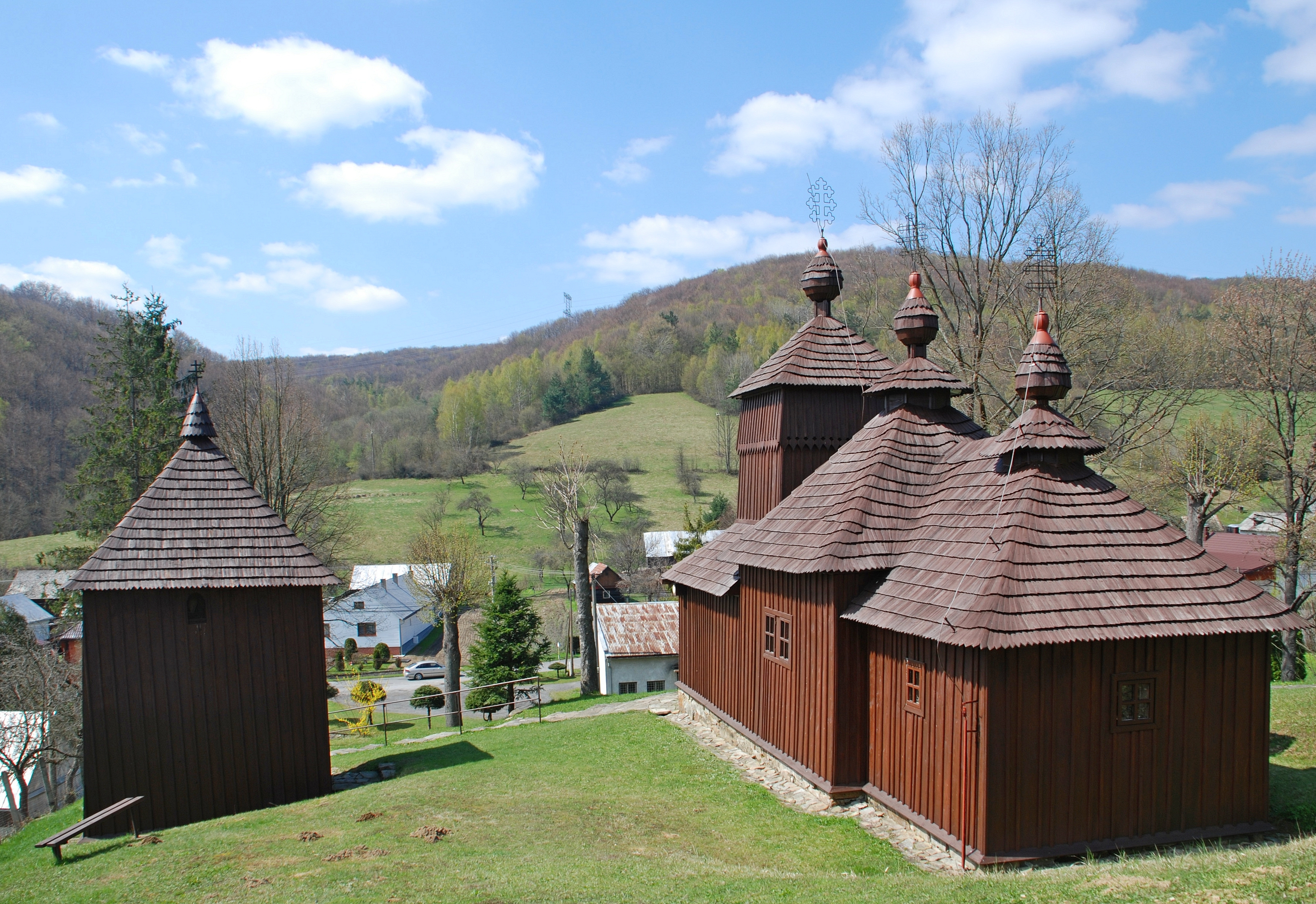 wieś Korejovce